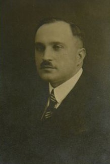 Emil Králíček (1877 - 1930), Český architekt.